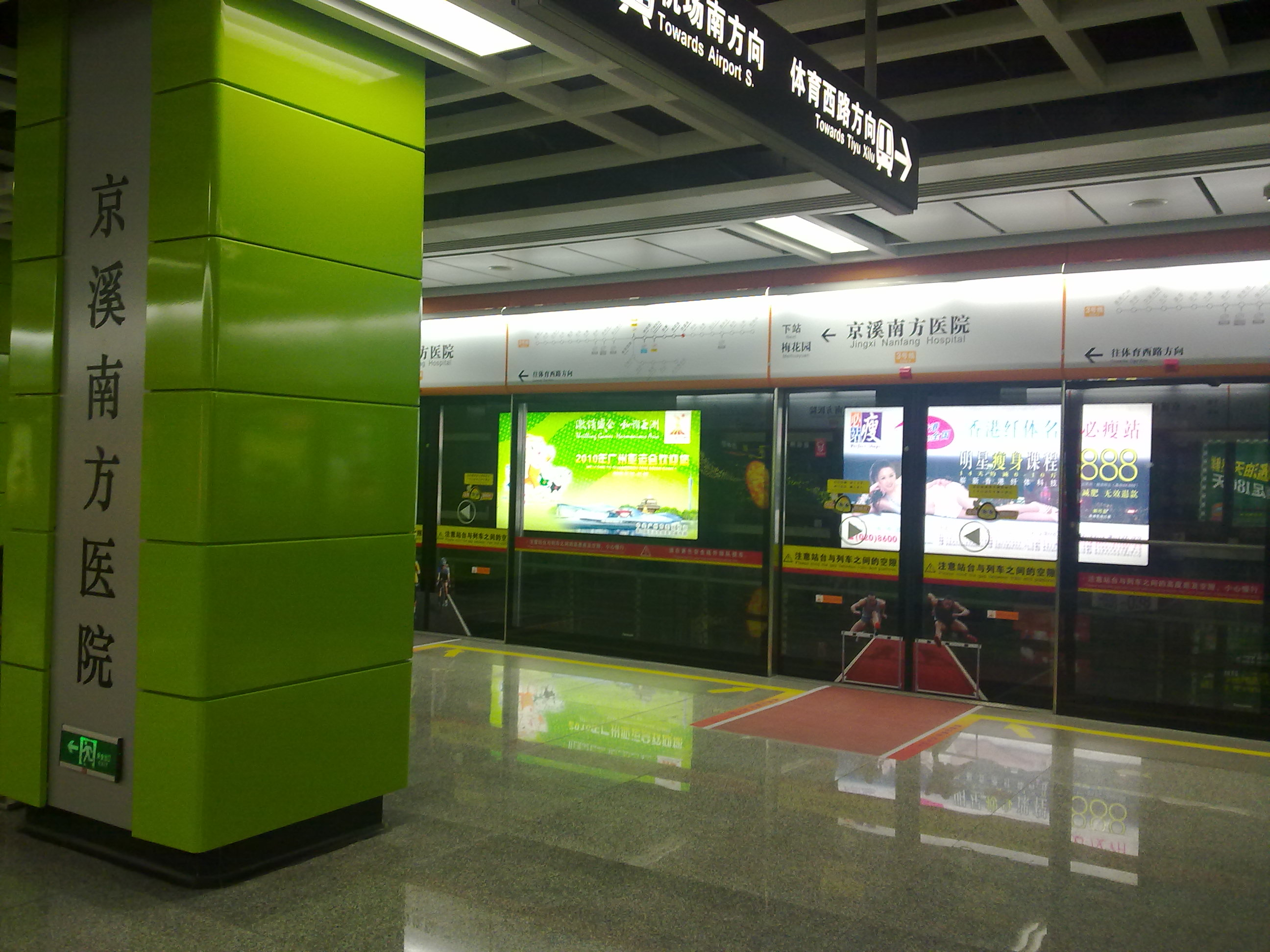 廣州地鐵京溪南方醫院站